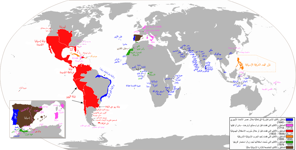 خريطة لِلأقاليم والمناطق الخاضعة لِلإمبراطوريَّة الإسبانيَّة خِلال المراحل المُختلفة من حياتها.